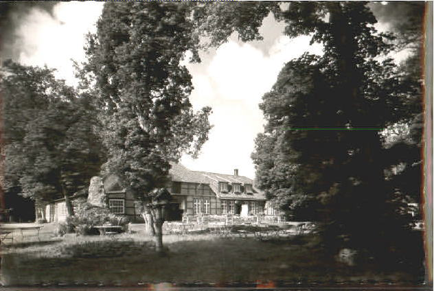 Quakenbrück, alter Schützenhof